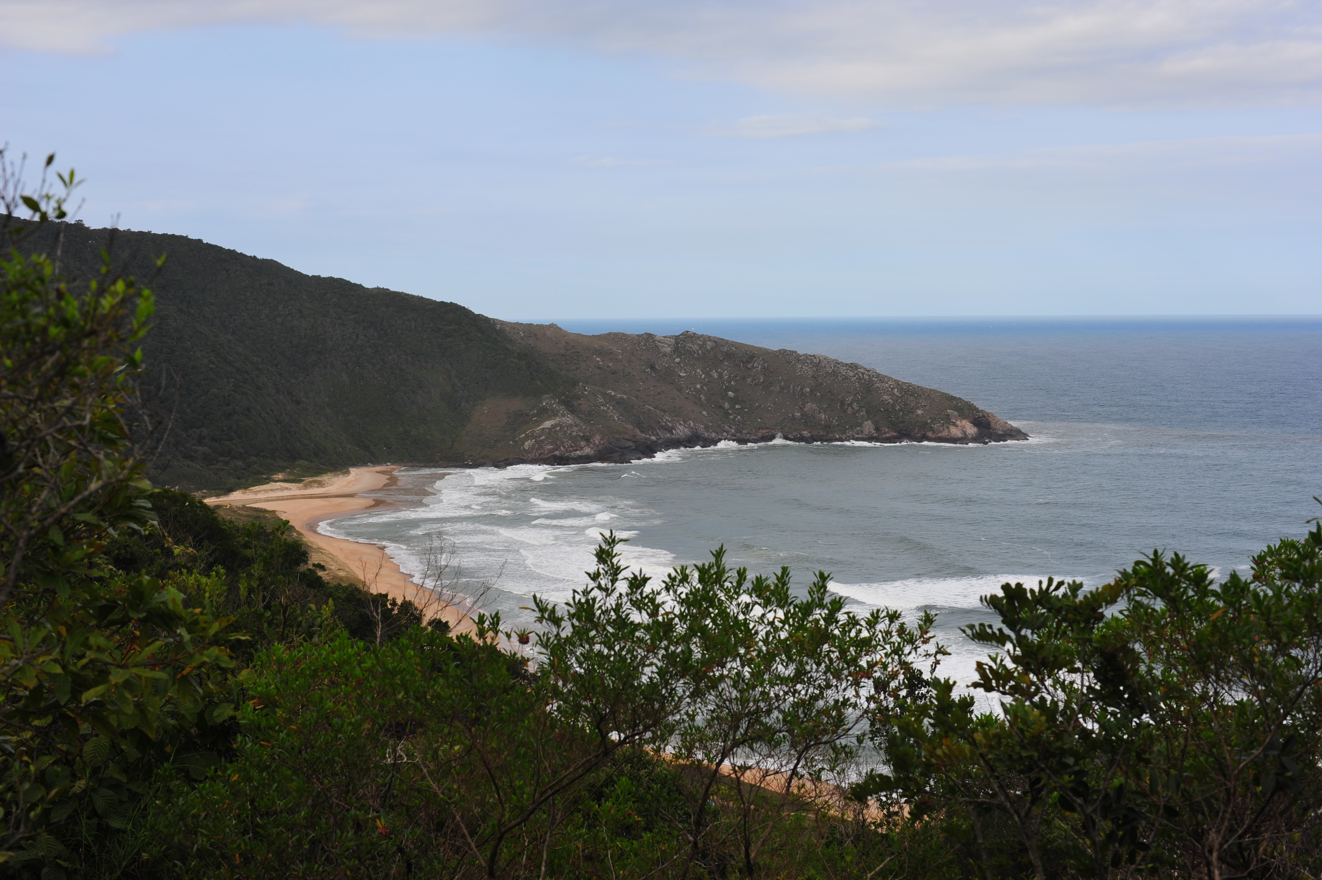 Praia da Lagoinha do Leste, Florianópolis, Brasil.